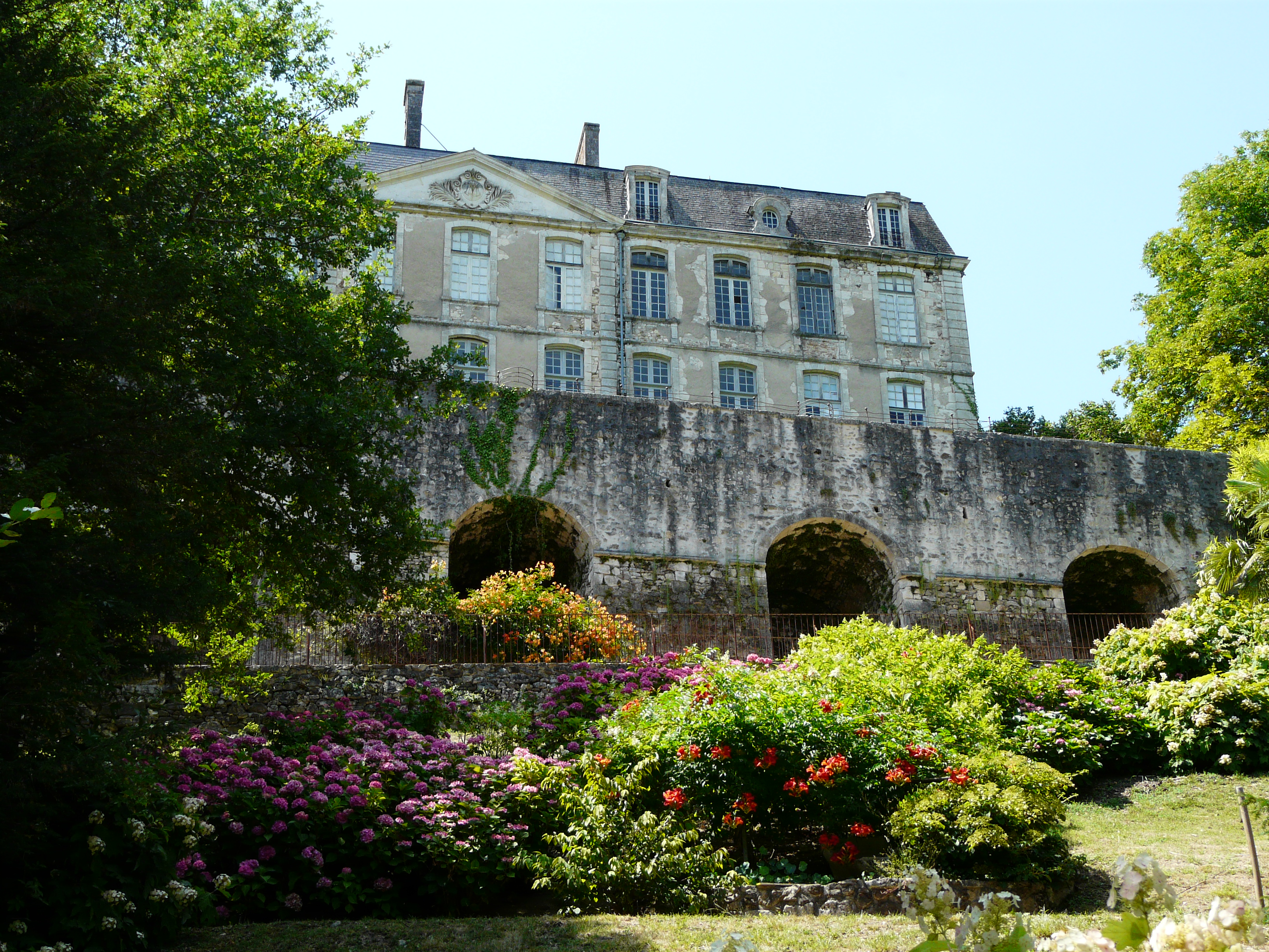 Le jardin des Arts au pied de la façade est du château de Nontron, Dordogne, France.